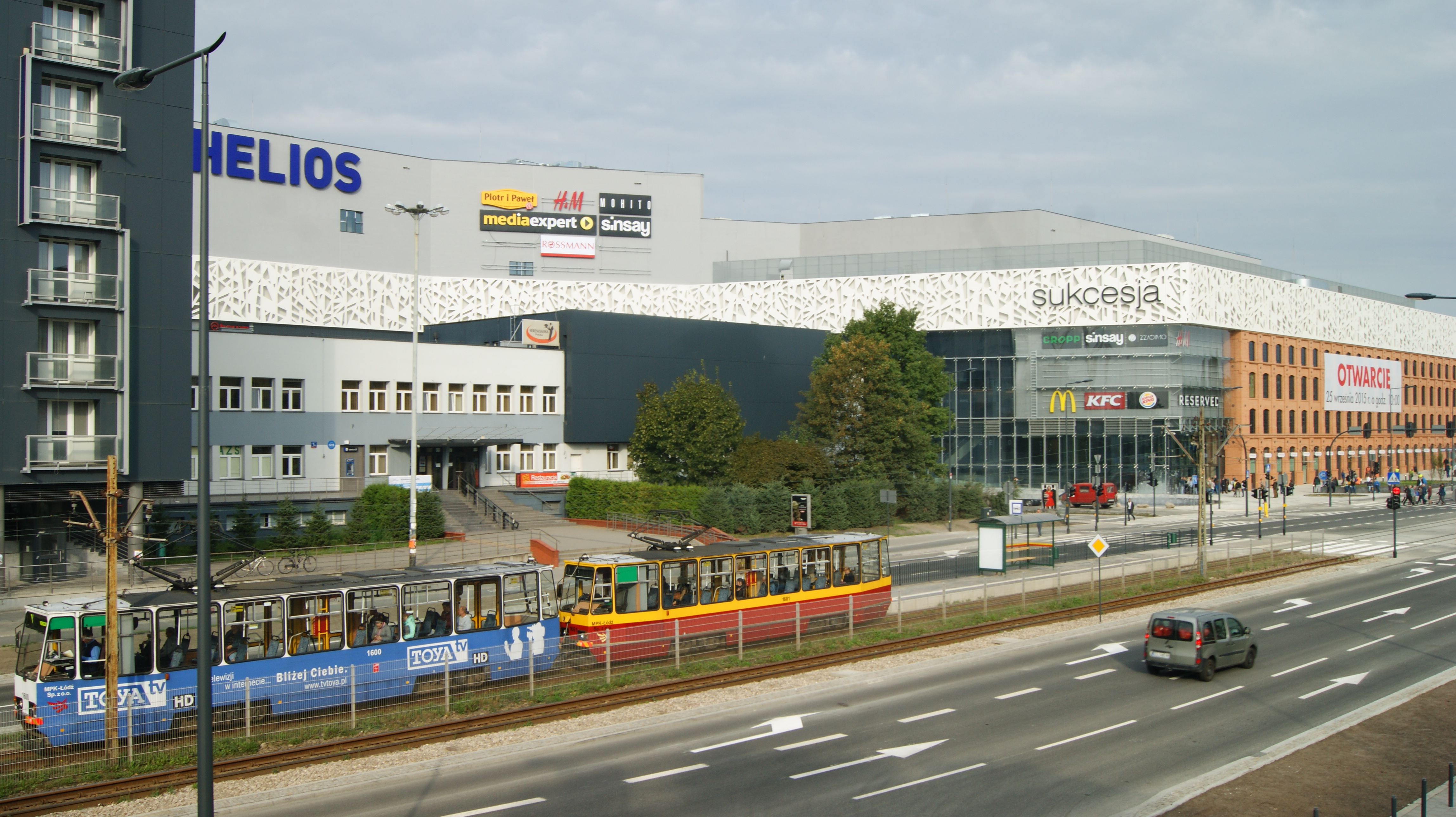 W dniu 25 września 2015 o godz. 10.00 otwarto Sukcesję Centrum Handlu I Rozrywki.